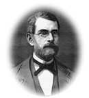 Jacob Neumann Mohn da han arbeidet for statistiske kontor i Indredepartementet